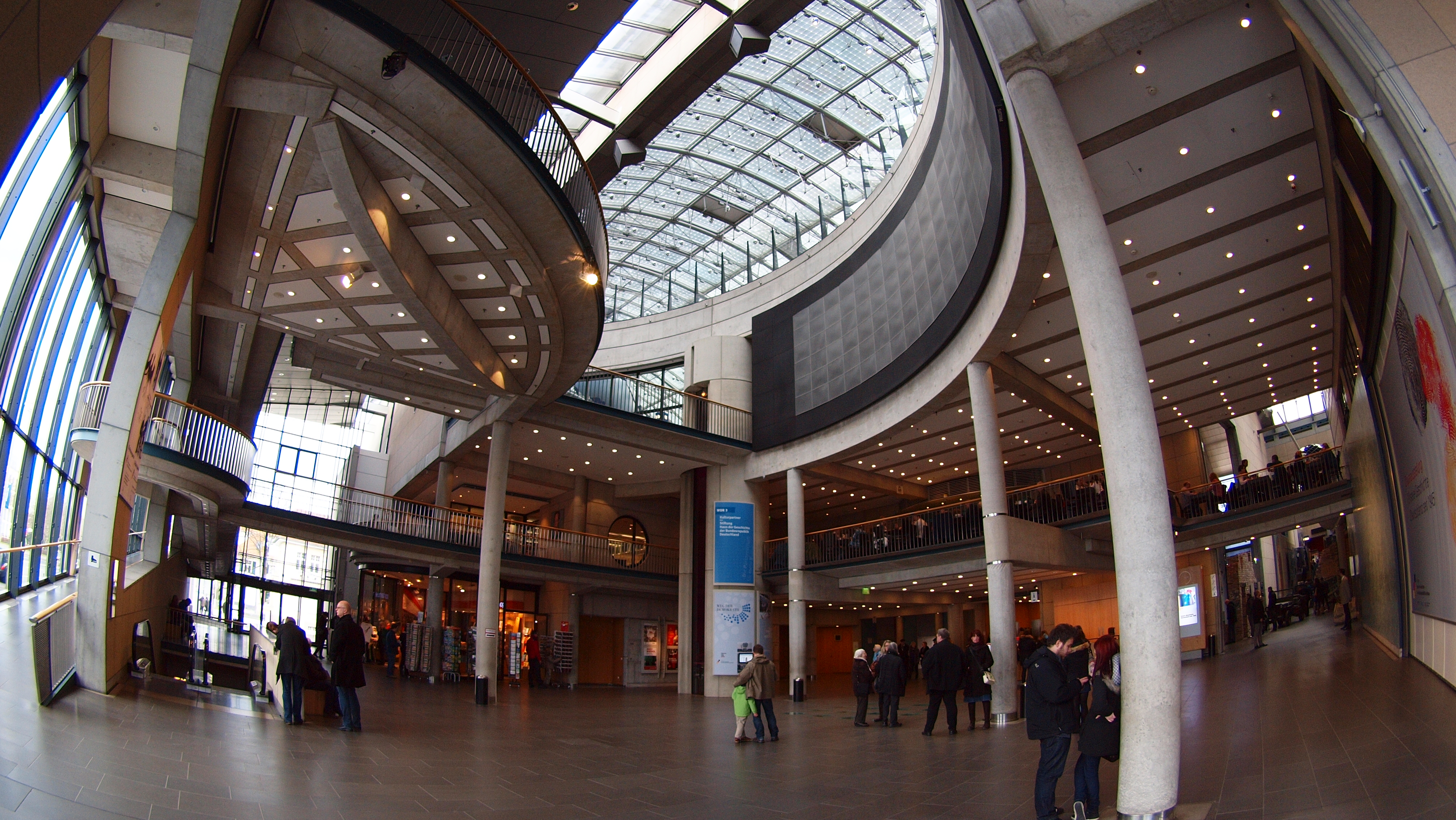 Haus der Geschichte in Bonn: Innenansicht Eingangsbereich